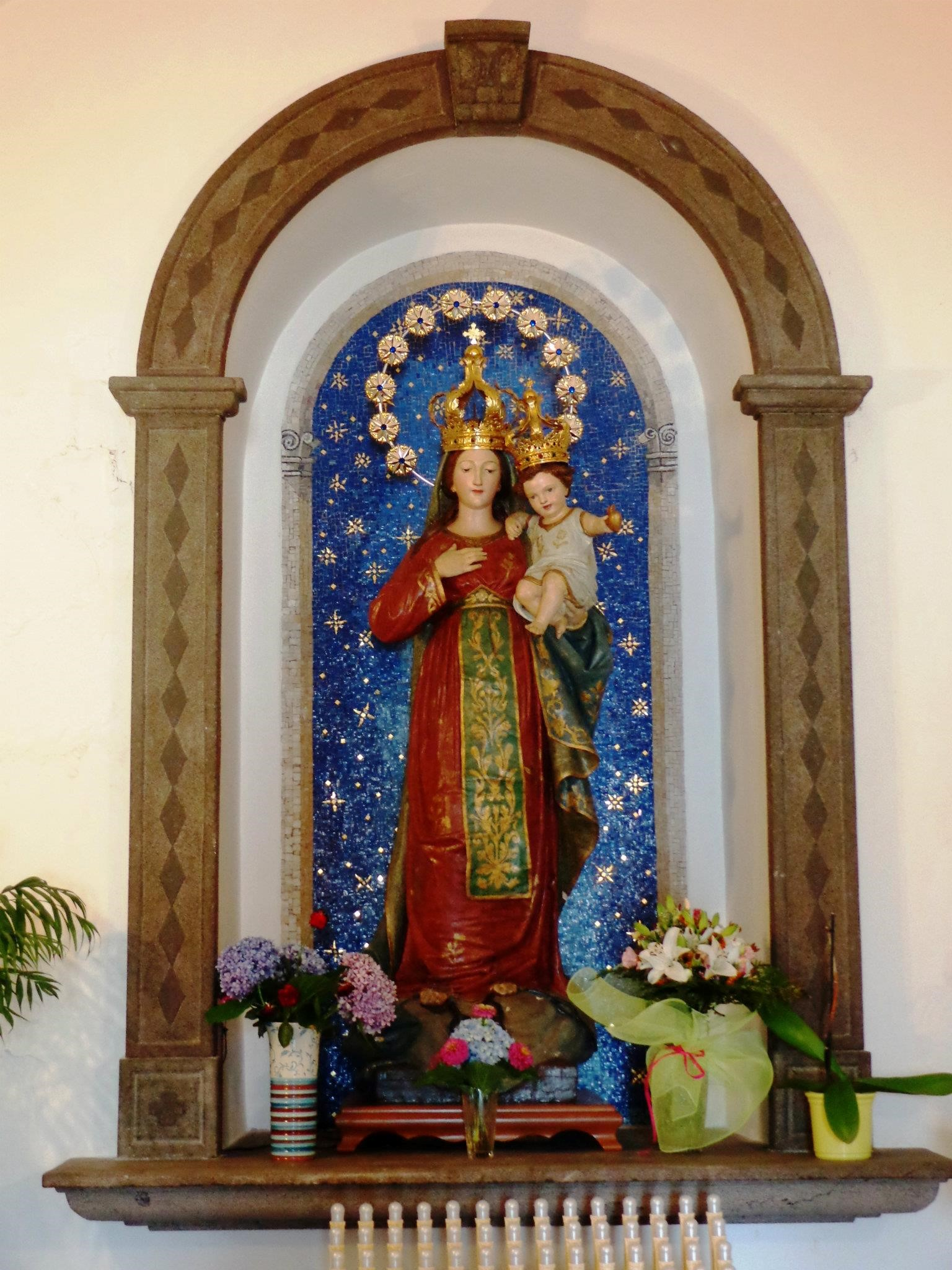 Dettaglio simulacro. Foto presente su pagine web personali e sul profilo FB.